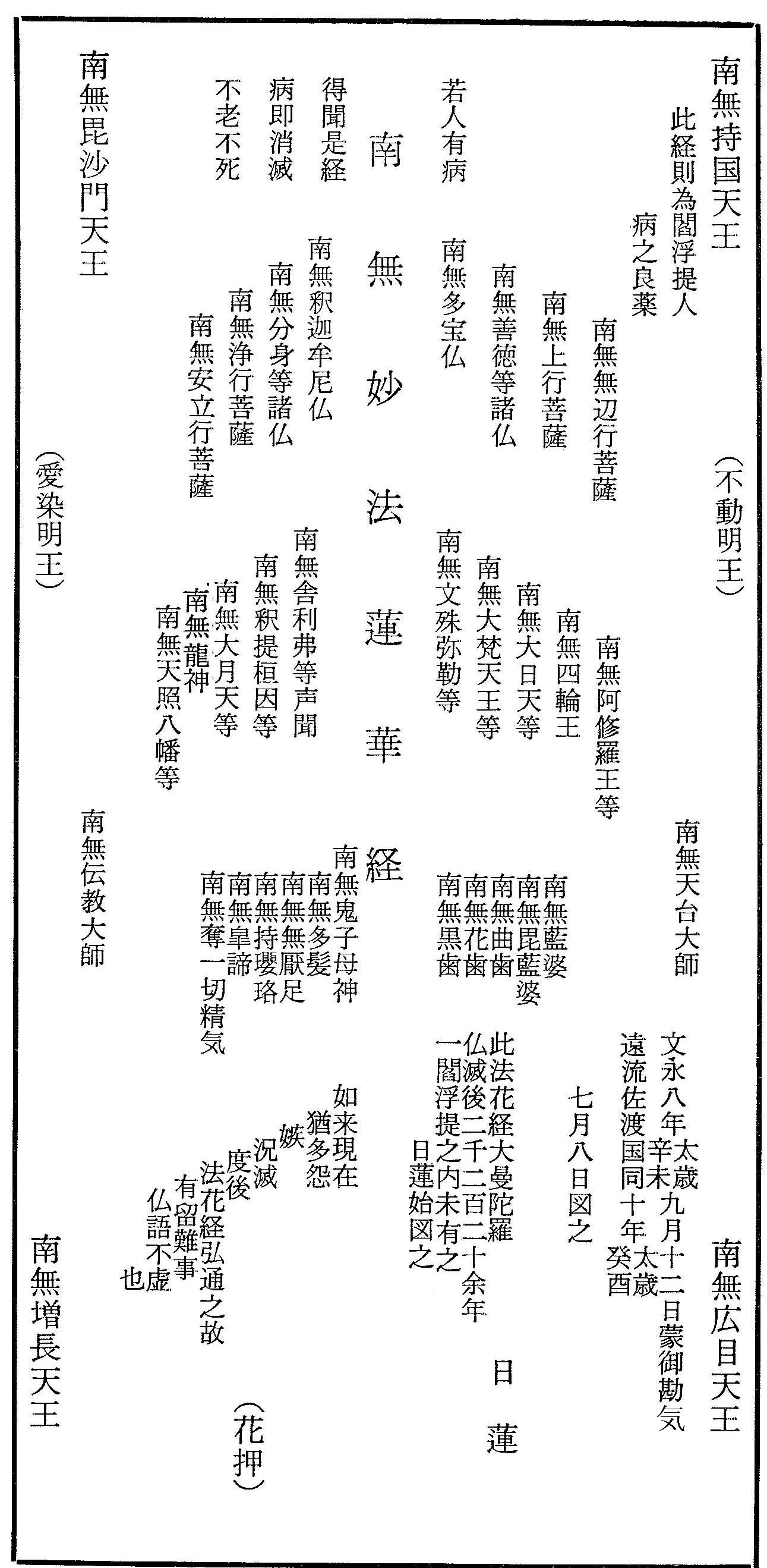 佐渡始顕本尊の読み解き